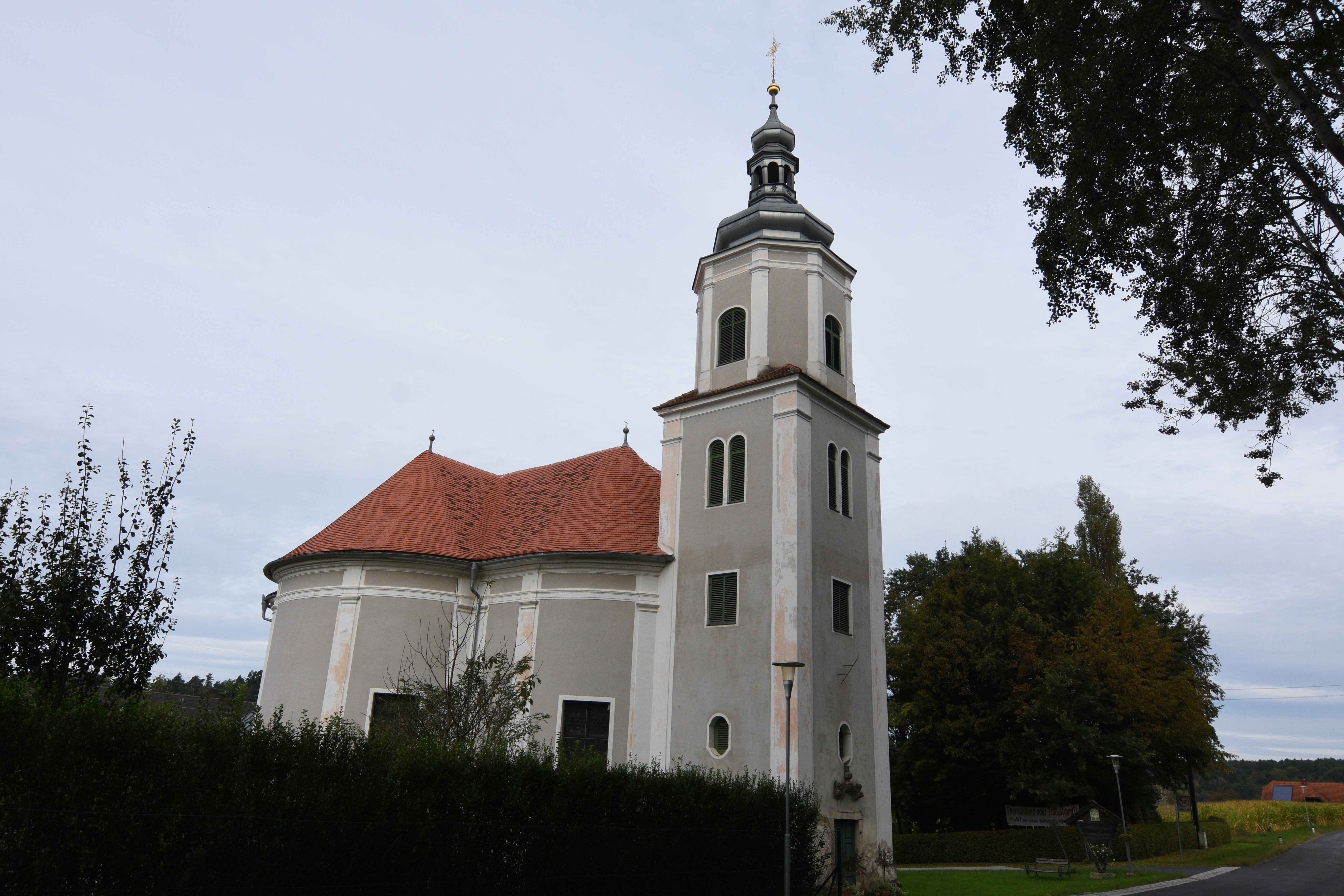 Kath. Filialkirche hl. Anna (Jobst) Bad Blumau